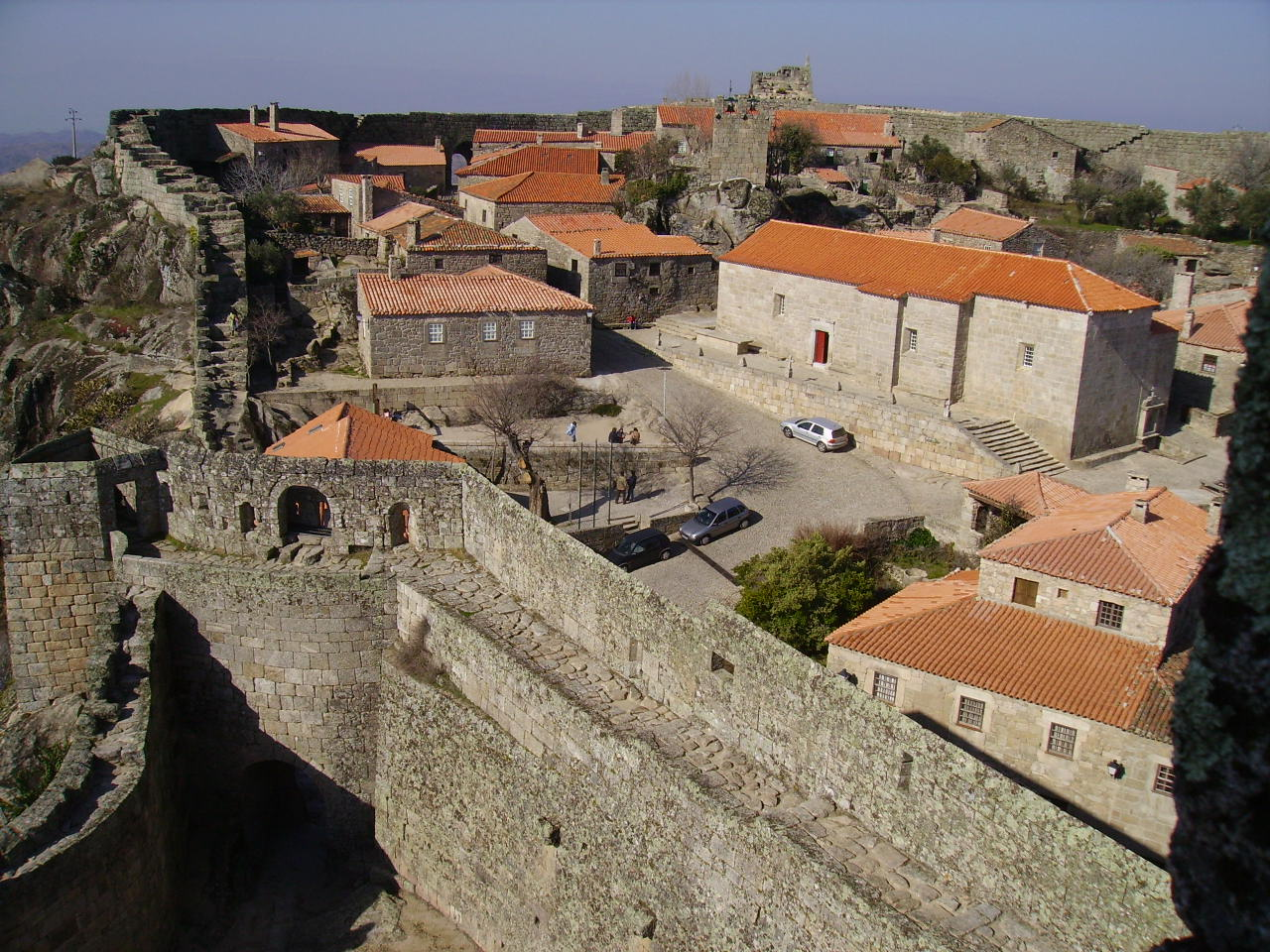 Sortelha, vista para o Campanário